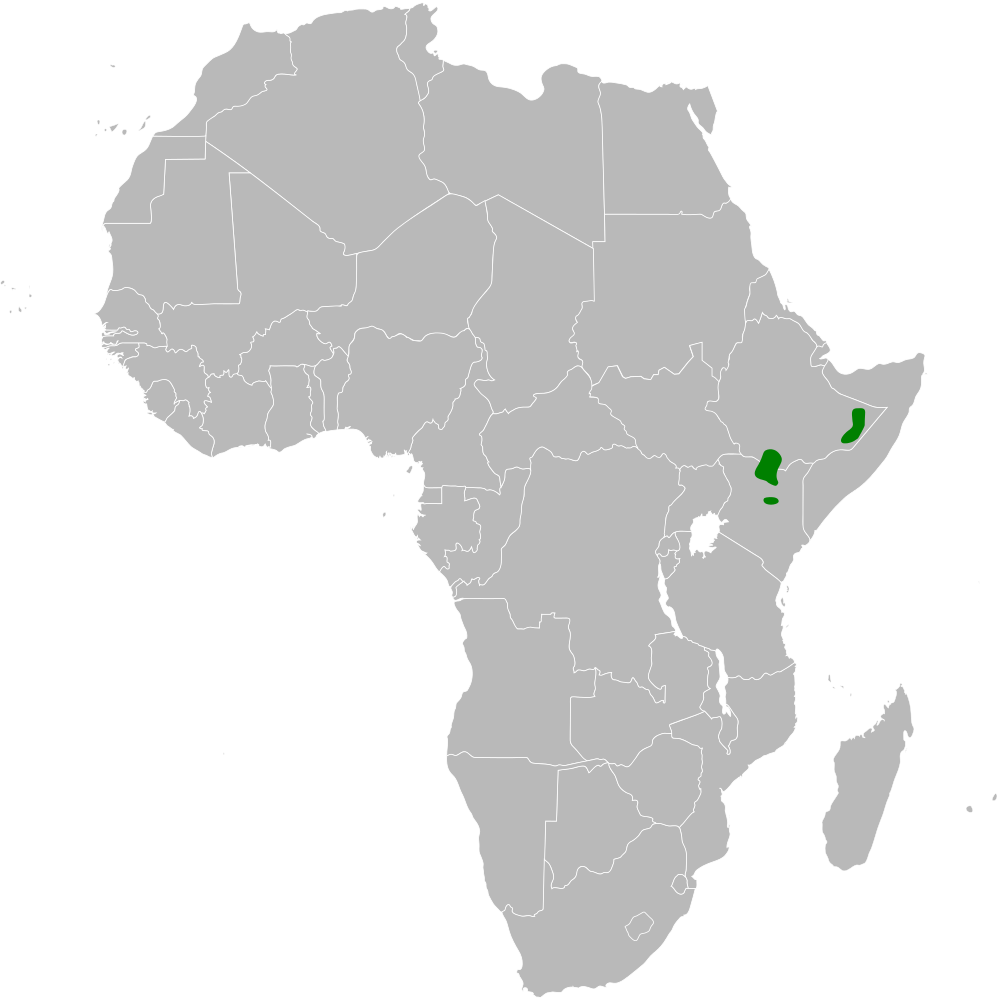 Spizocorys personata distribution map; using BlankMap-Africa.svg, based on